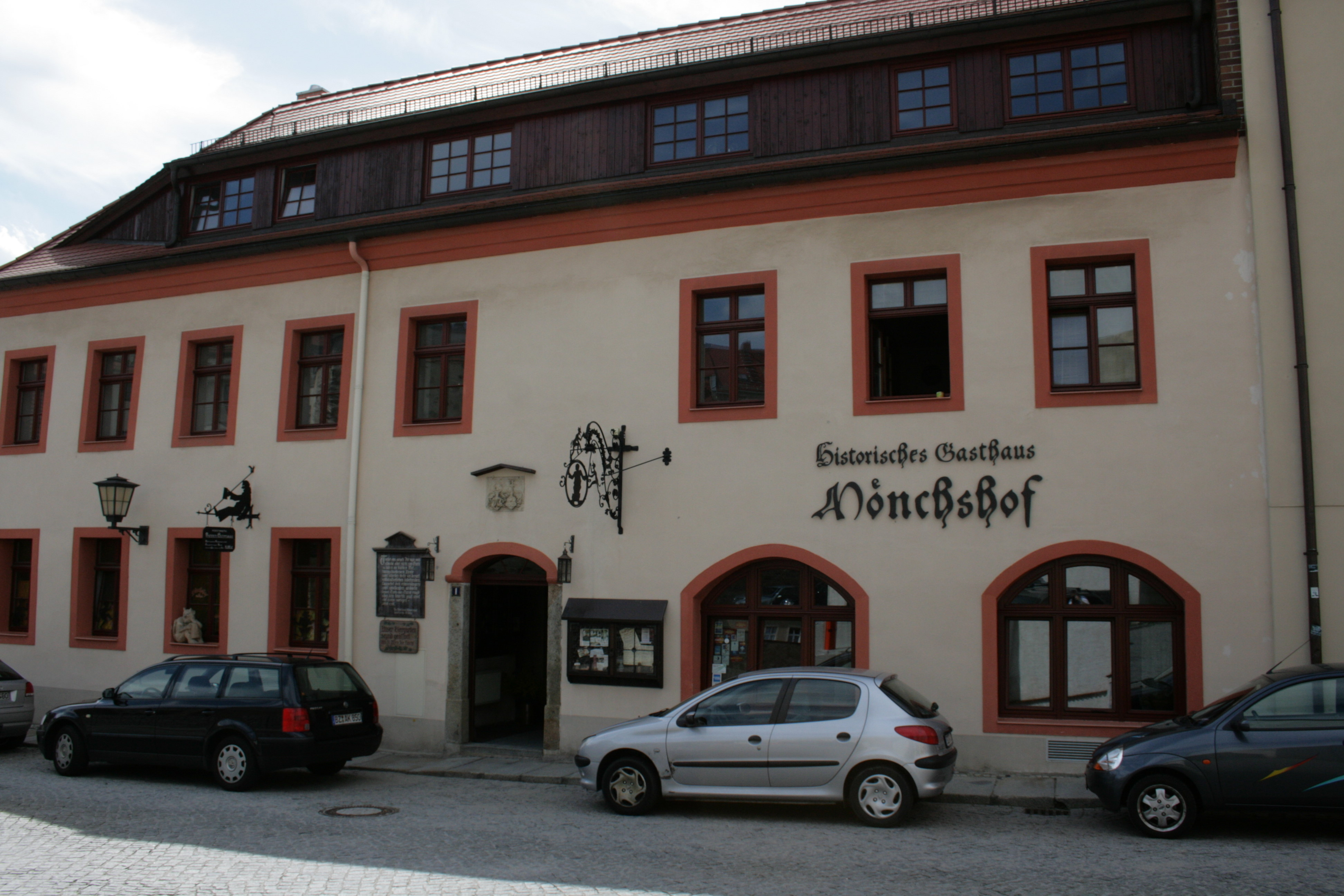 Restaurant „Mönchshof zu Bautzen“ am Burglehn 1 in Bautzen